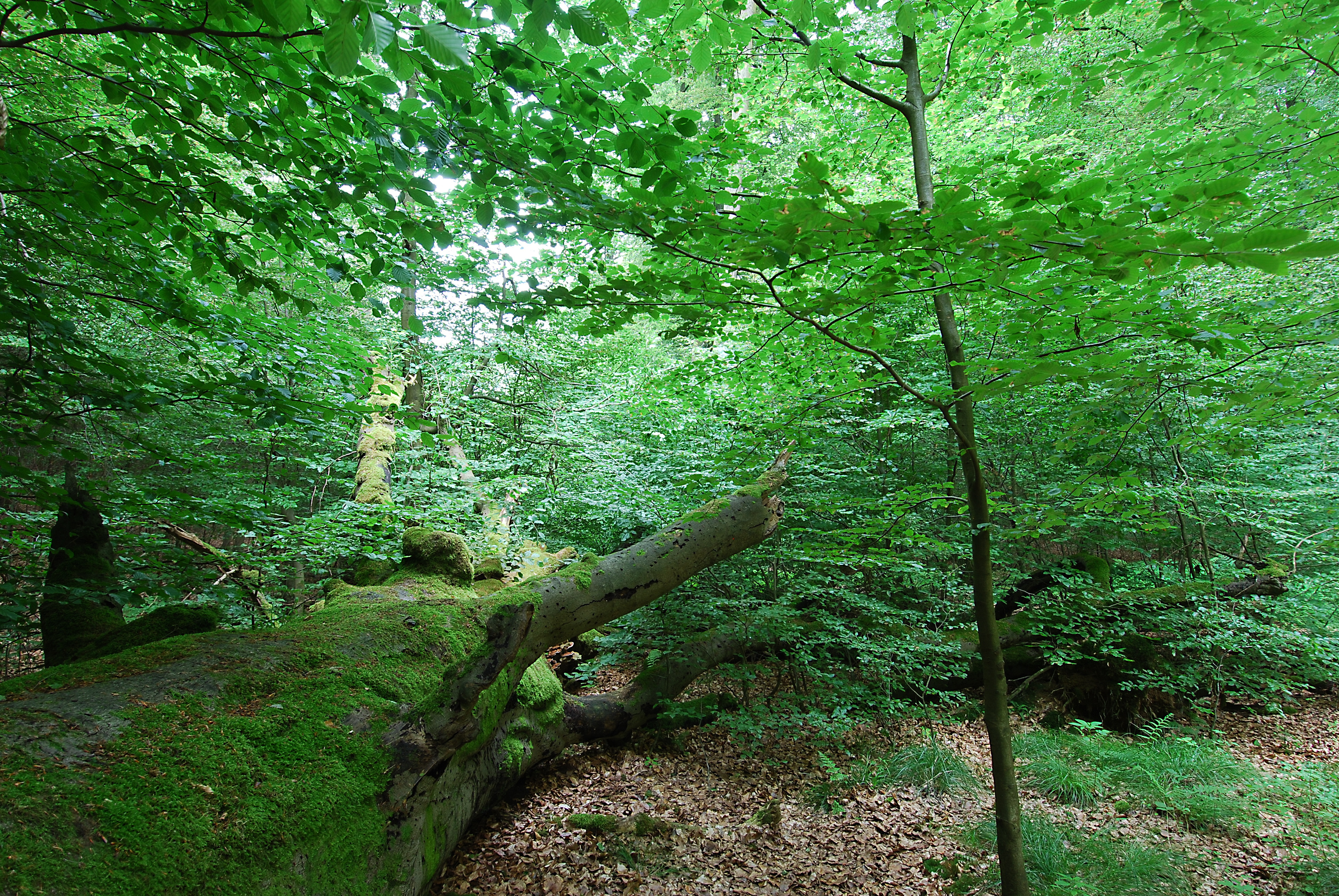 Naturschutzgebiet Waldreservat Obereimer (NSG HSK-168). Schiller-Buche im Hochsauerlandkreis bei Arnsberg im Territorium des ehemaligen Kurfürstlichen Thiergartens. Die Schiller-Buche wurde am 18.01.2007 durch den Sturm Kyrill umgeworfen. Die Standfestigkeit war zu diesem Zeitpunkt aufgrund von Wurzelverlust durch Säure im Boden vermindert. In unmittelbarer Nähe steht die ebenfalls sehr alte Goethe-Eiche. Koordinaten des Standortes: N 051° 23.878' O 008° 02.502'